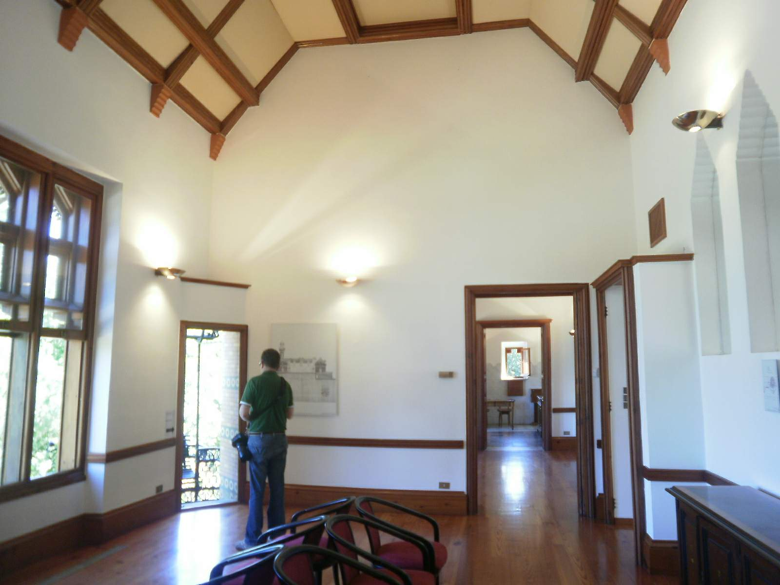 Capricho de Gaudí (Comillas)